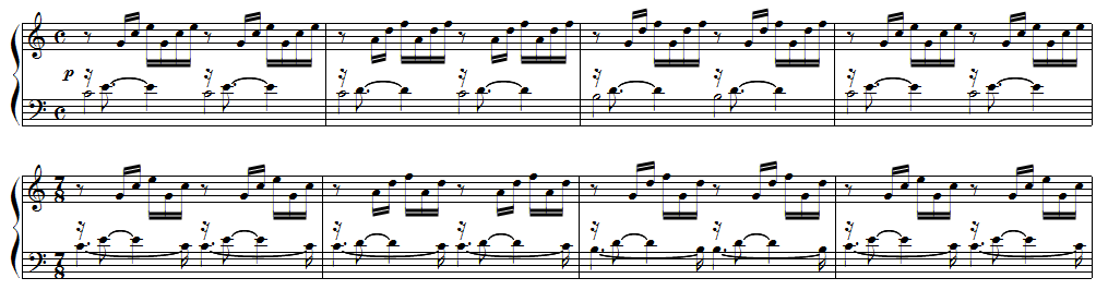 Bach prélude BWV 846 à 7 temps (Alexandre Astier)